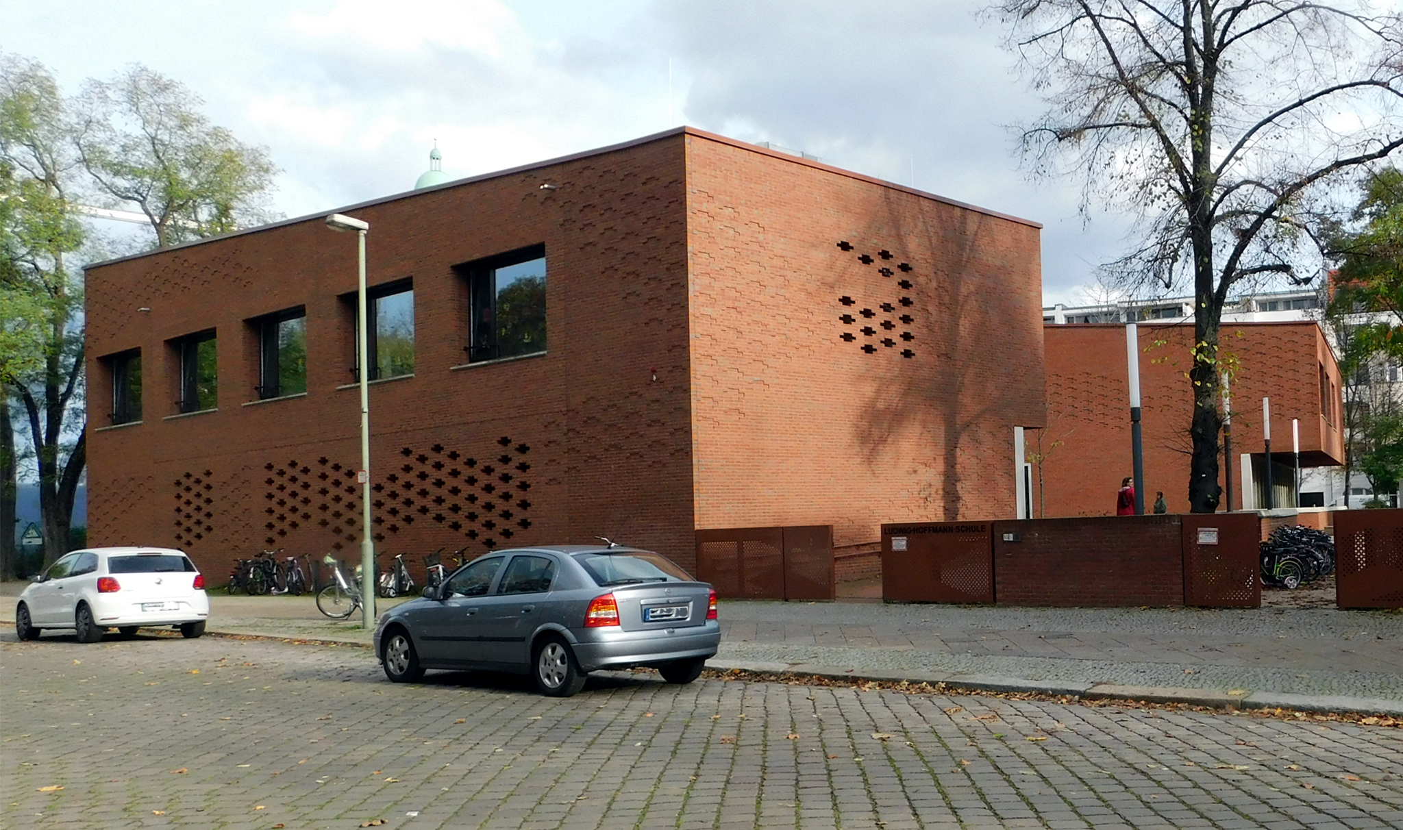 Der 2010 bis 2012 nach Plänen der AFF Architekten errichtete 8 bis 10 m hohe zweigeschossige Erweiterungsbau für die Ludwig-Hoffmann-Grundschule in der Lasdehner Straße (Berlin-Friedrichshain) steht nördlich in einiger Entfernung vom historischen Gebäude mit der Westflanke zur Straße. Nach dem Vorbild des Hoffmann-Baus besteht die Fassade aus rot-orangenen Backsteinen. Auffällig ist neben den großen Fenstern die moderne Ornamentik an der Fassade, erzielt durch zurückgesetzte oder ausgelassene Klinker.